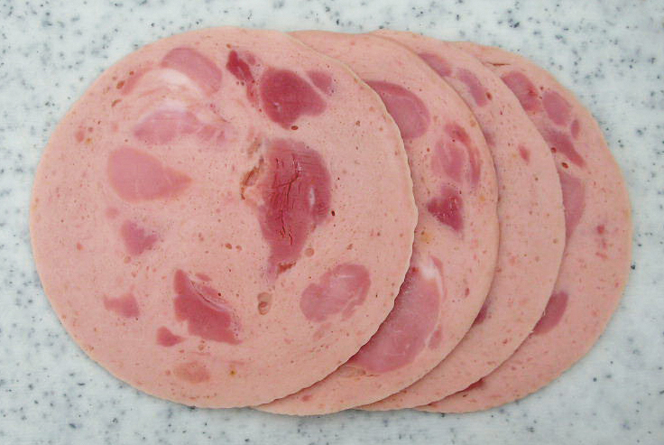 Foto von geschnittenem Bierschinken